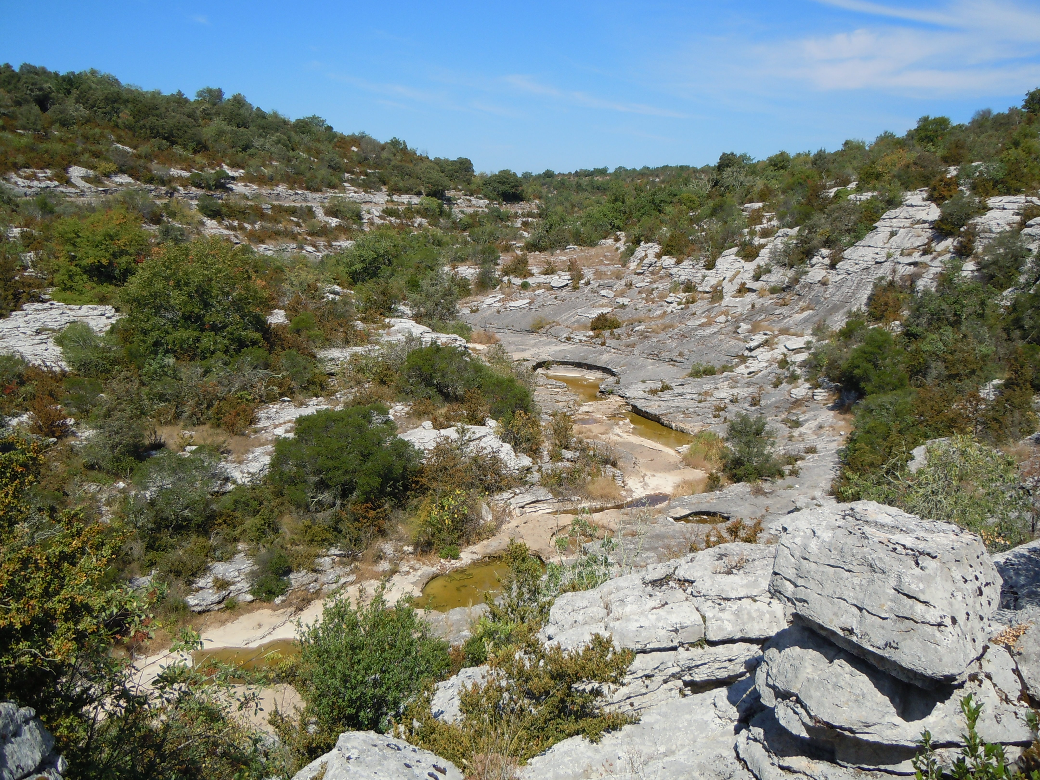 Plateau des Gras - Saint Alban Sous Samzon - Ardèche - France : Vallon de Fontgraze